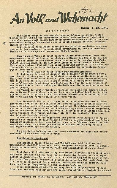 Aufruf der 50. Generale an Volk und Wehrmacht